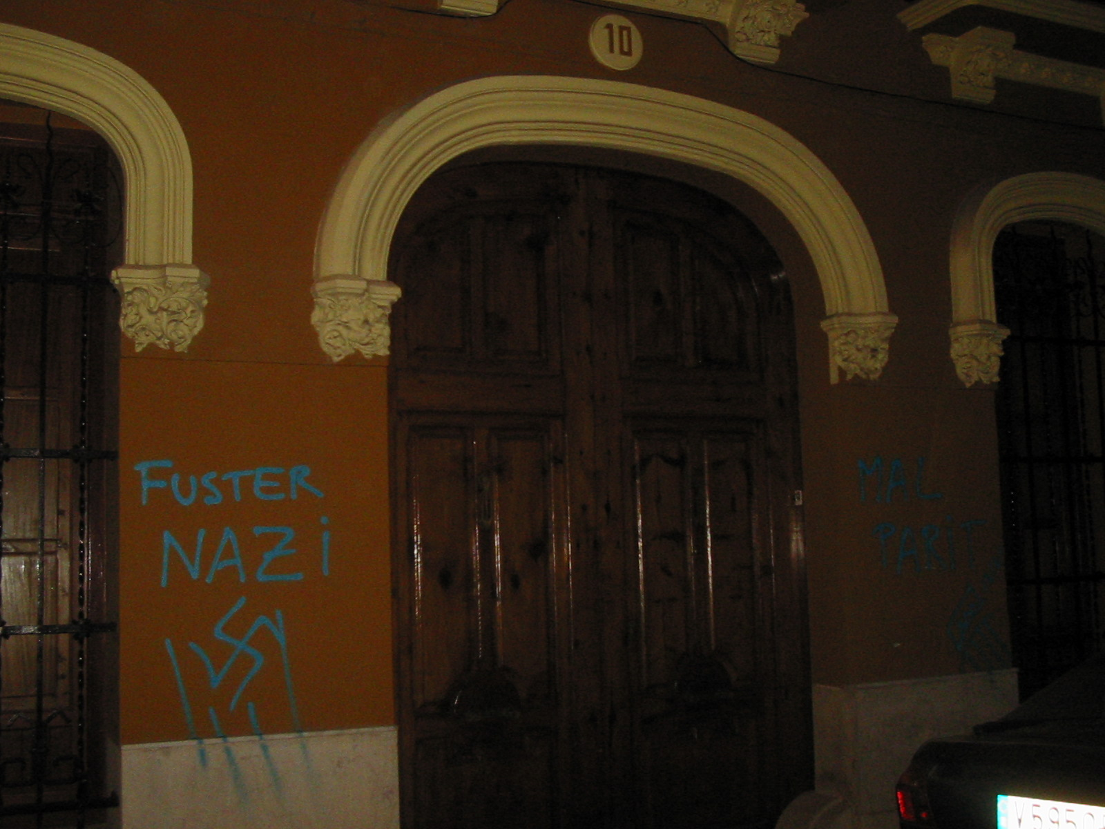 Pintades blaveres en la casa i el monument a Joan Fuster en Sueca en 2006. A finals d'agost de 2006 han aparegut pintades blaveres en el monument i la casa natal de l'escriptor i intel.lectual Joan Fuster al seu poble nadiu de Sueca (Ribera Baixa). En aquesta imatge veiem pintades en la porta de la casa on visqué.